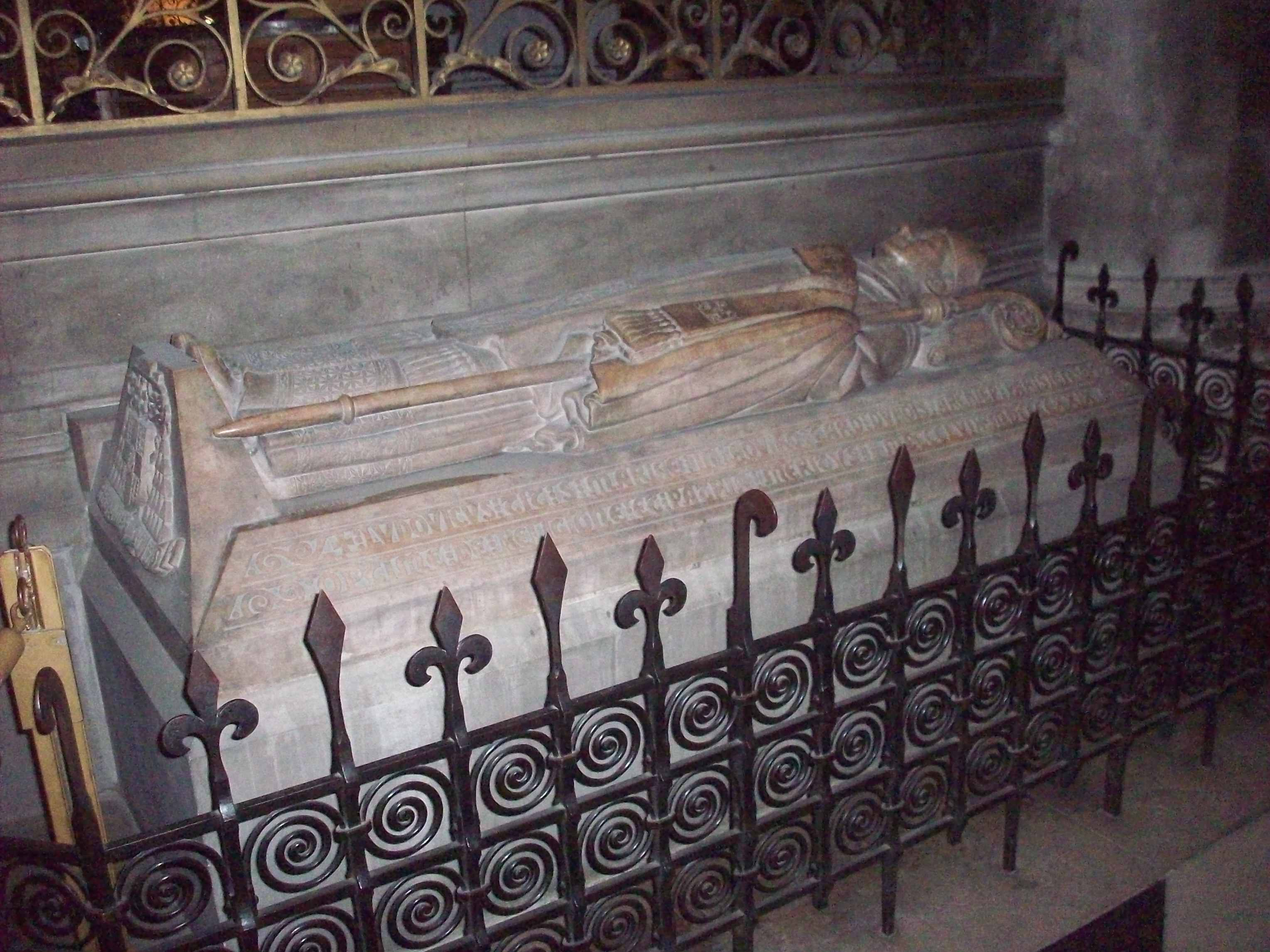 Gisant de Louis-Ernest Dubois (1856-1929), évêque de Verdun, archevêque de Bourges, Rouen puis Paris, cardinal, dans le déambulatoire. Épitaphe: « + LUDOVICUS TIS S MARIÆ IN AOVIRO CARD DUBOIS ARCHIEP PARISIEN OPTIME DE RELIGIONE ET MATRIA MERITUS MDCCCLVI + MDCCCCXXIX + » Œuvre du sculpteur Henri Bouchard.